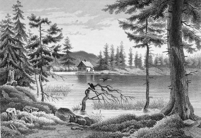 Oderteich